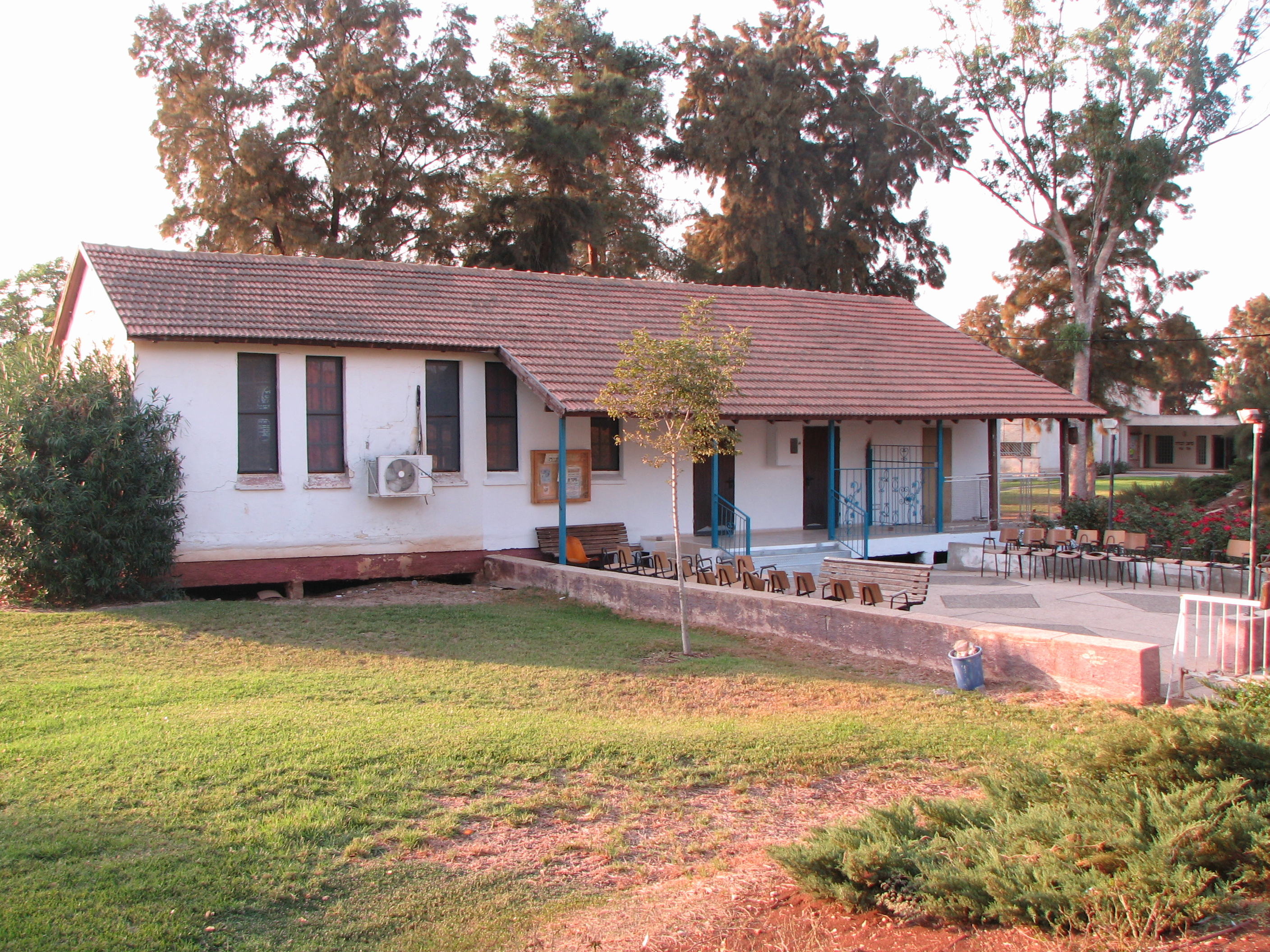 בית הכנסת במושב דבורה